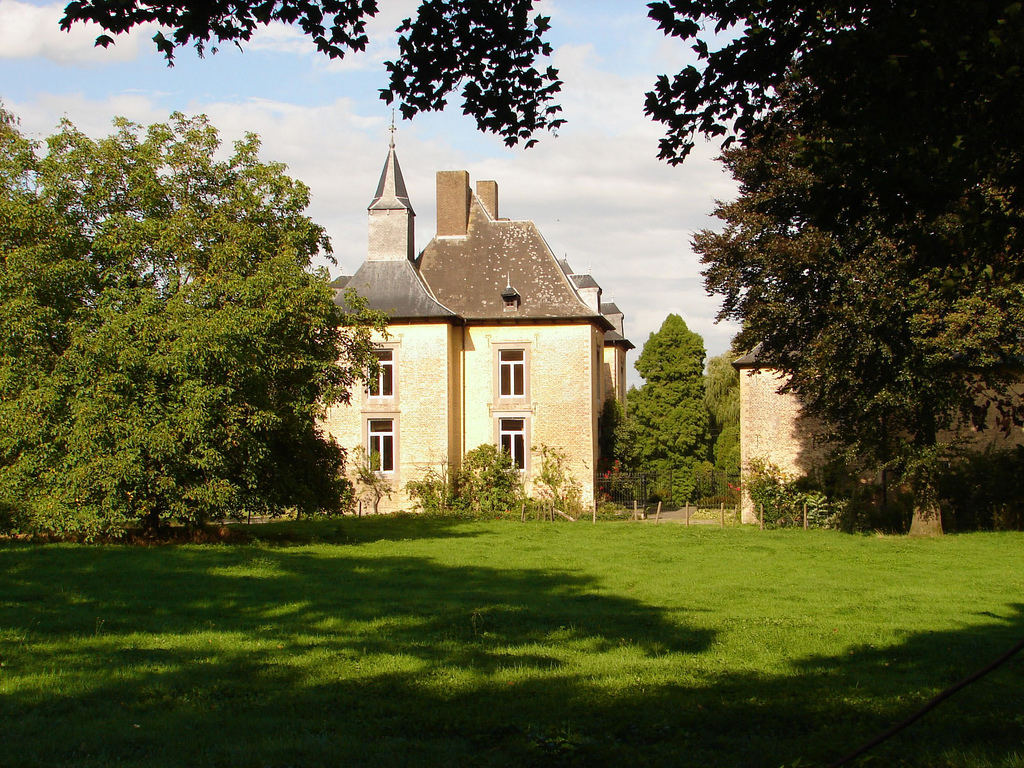 Het kasteel van Schalkhoven